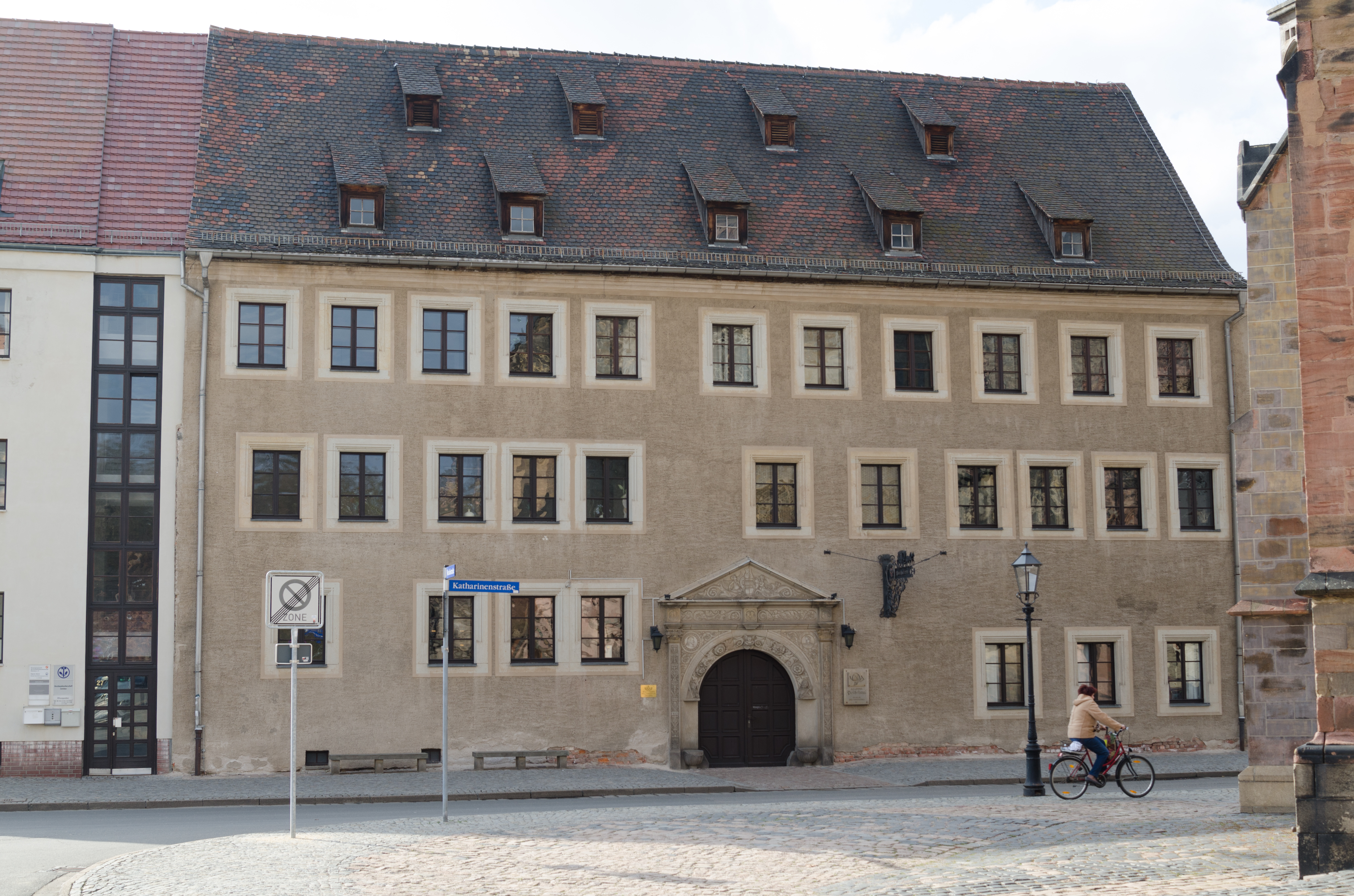 Zwickau, Katharinenstraße 27